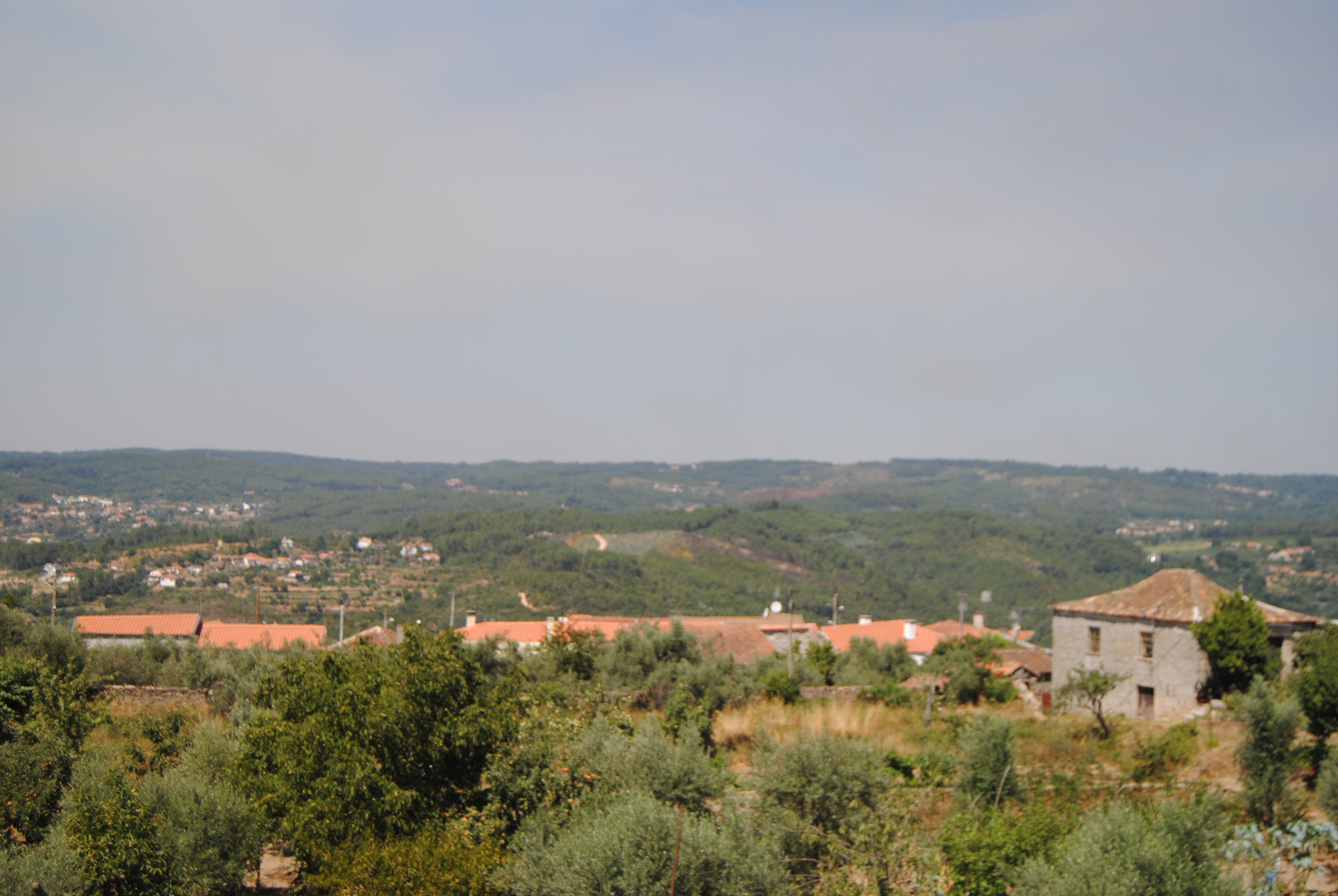 Vista Este